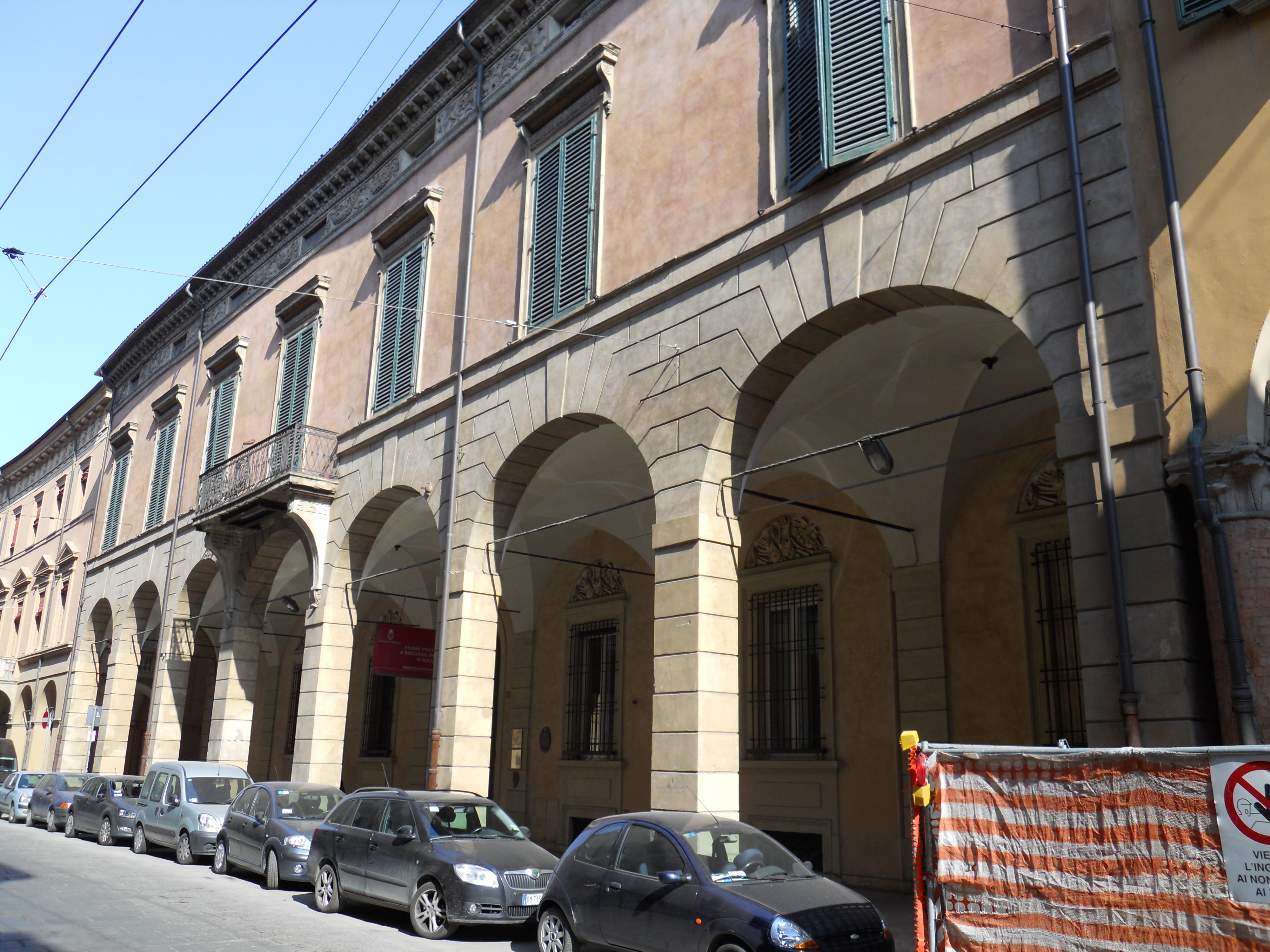 Prospetto di Palazzo Sanguinetti, strada Maggiore 34, Bologna, Italia